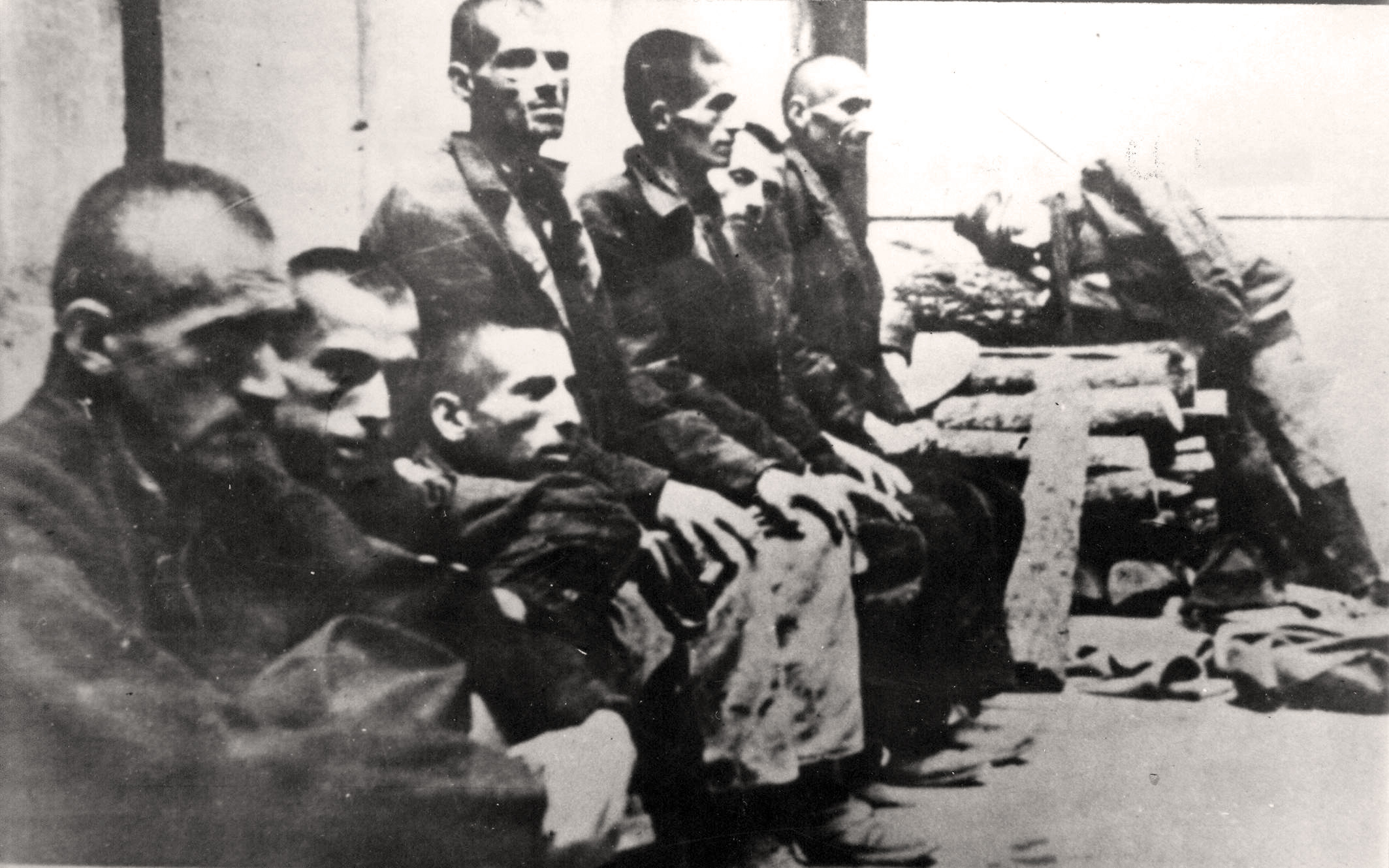 Srpskohrvatski / српскохрватски: Срби интернирци из конц-логора Јасеновац, Хрватска 1942.